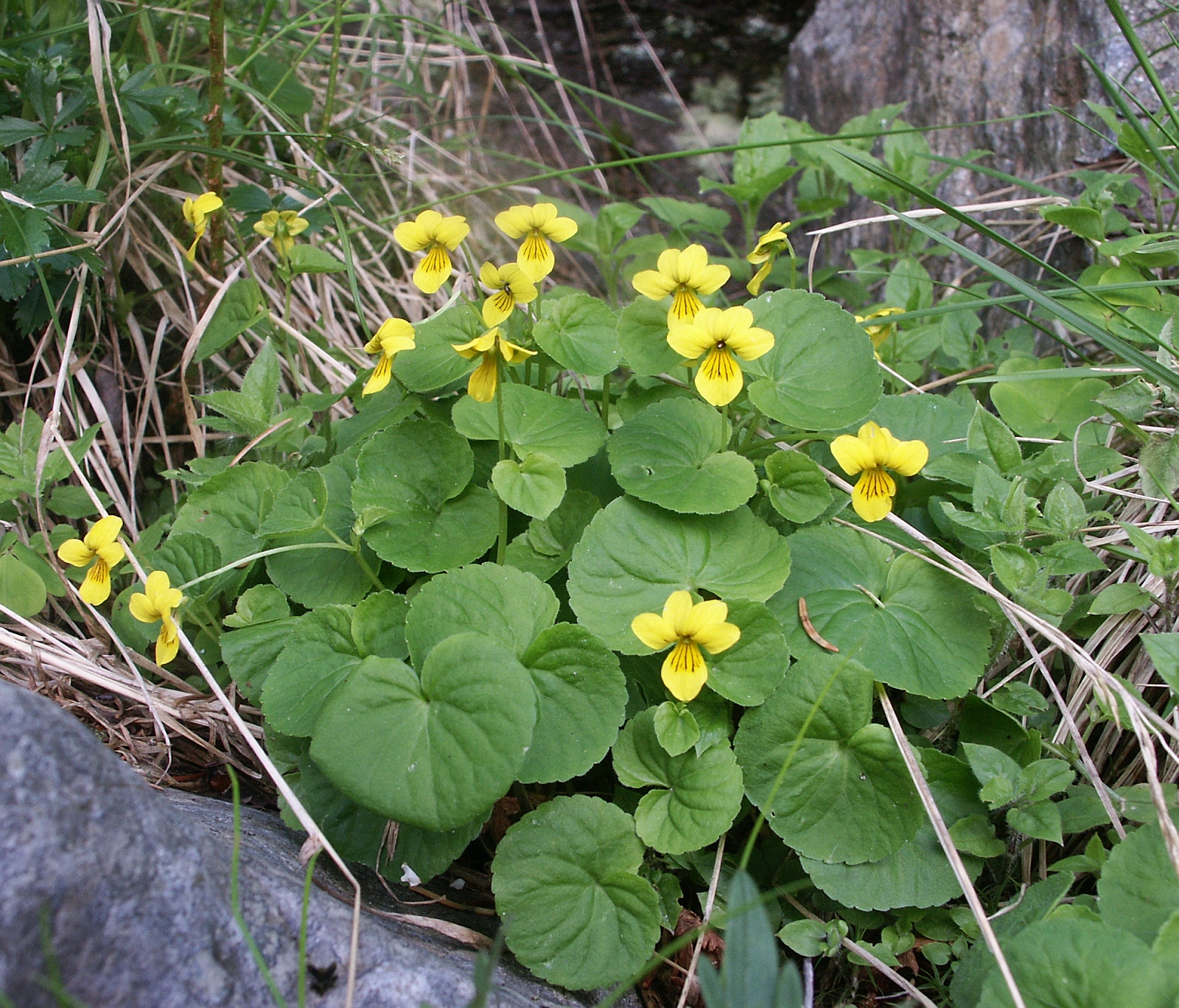 Viola biflora, Ridnauntal, Italy